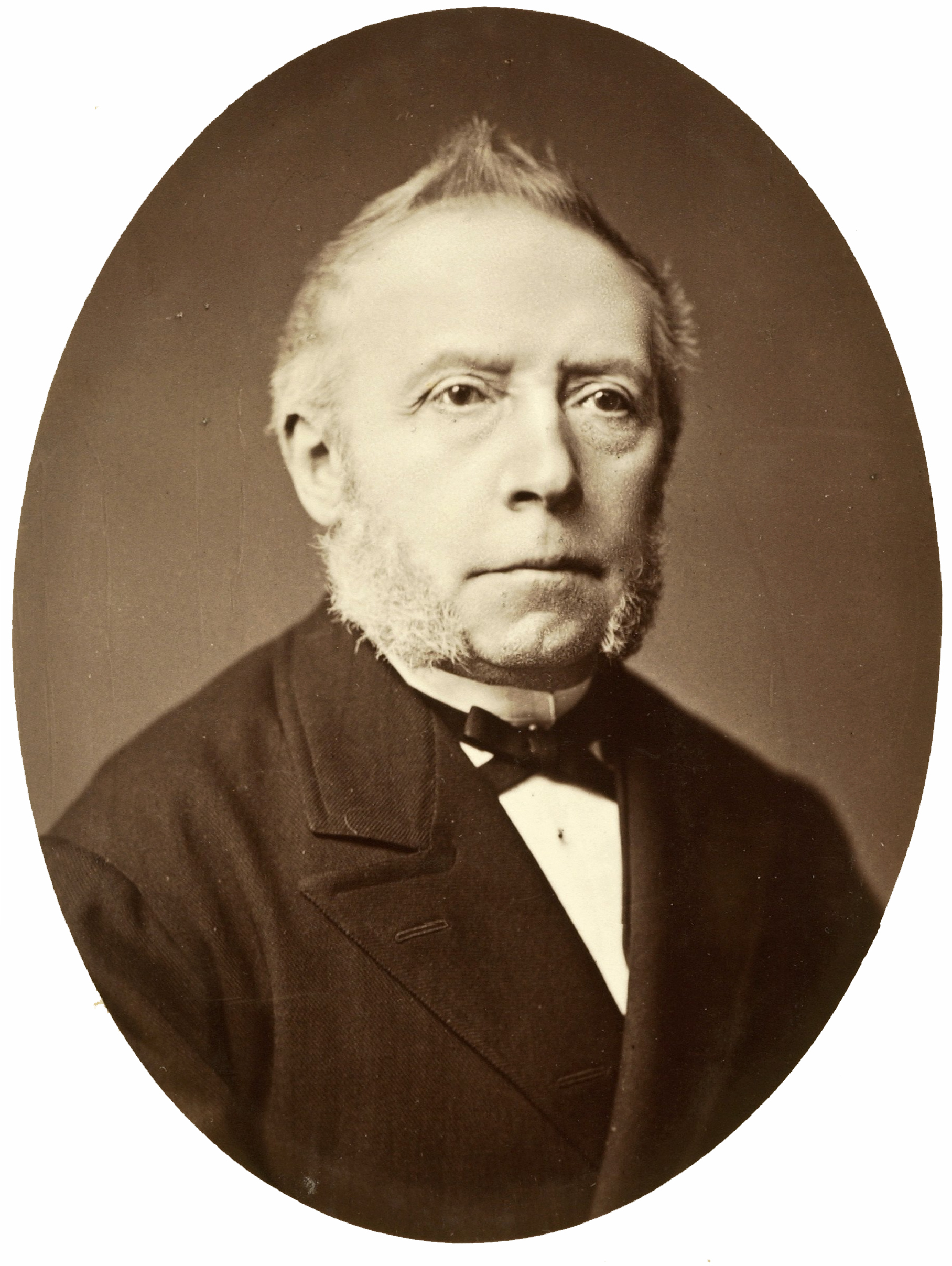 Portret van de muziekmeester Wigbold Balthazar Weidner (1814-1902)